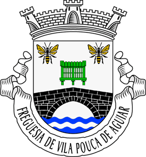 Brasão da freguesia de Vila Pouca de Aguiar (concelho de Vila Pouca de Aguiar)